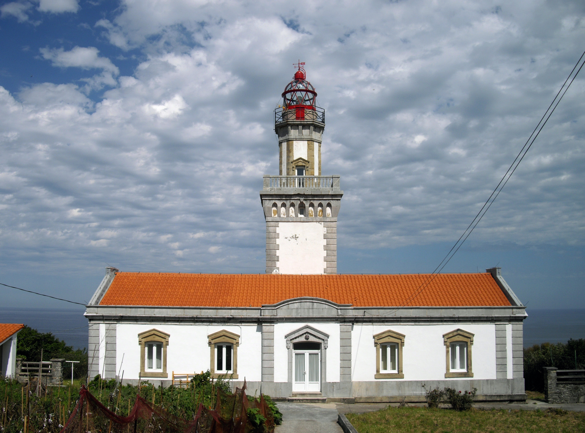 Phare du cap Higuer (Fontarrabie, Espagne)